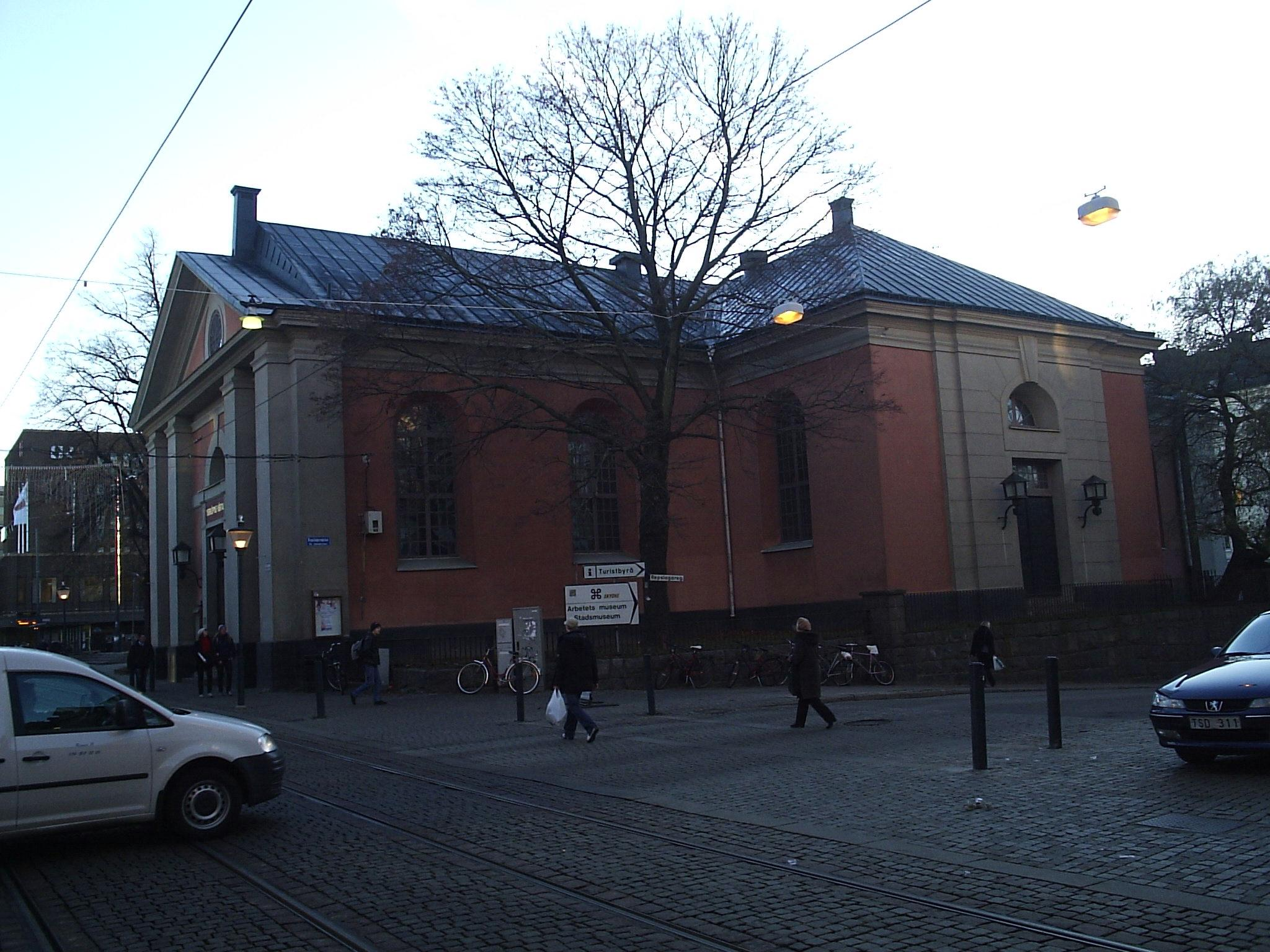 Hörsalen, gamla Sankt Johannes kyrka i Norrköping. Fotograferad av Harri Blomberg, den 20 nov 2005.